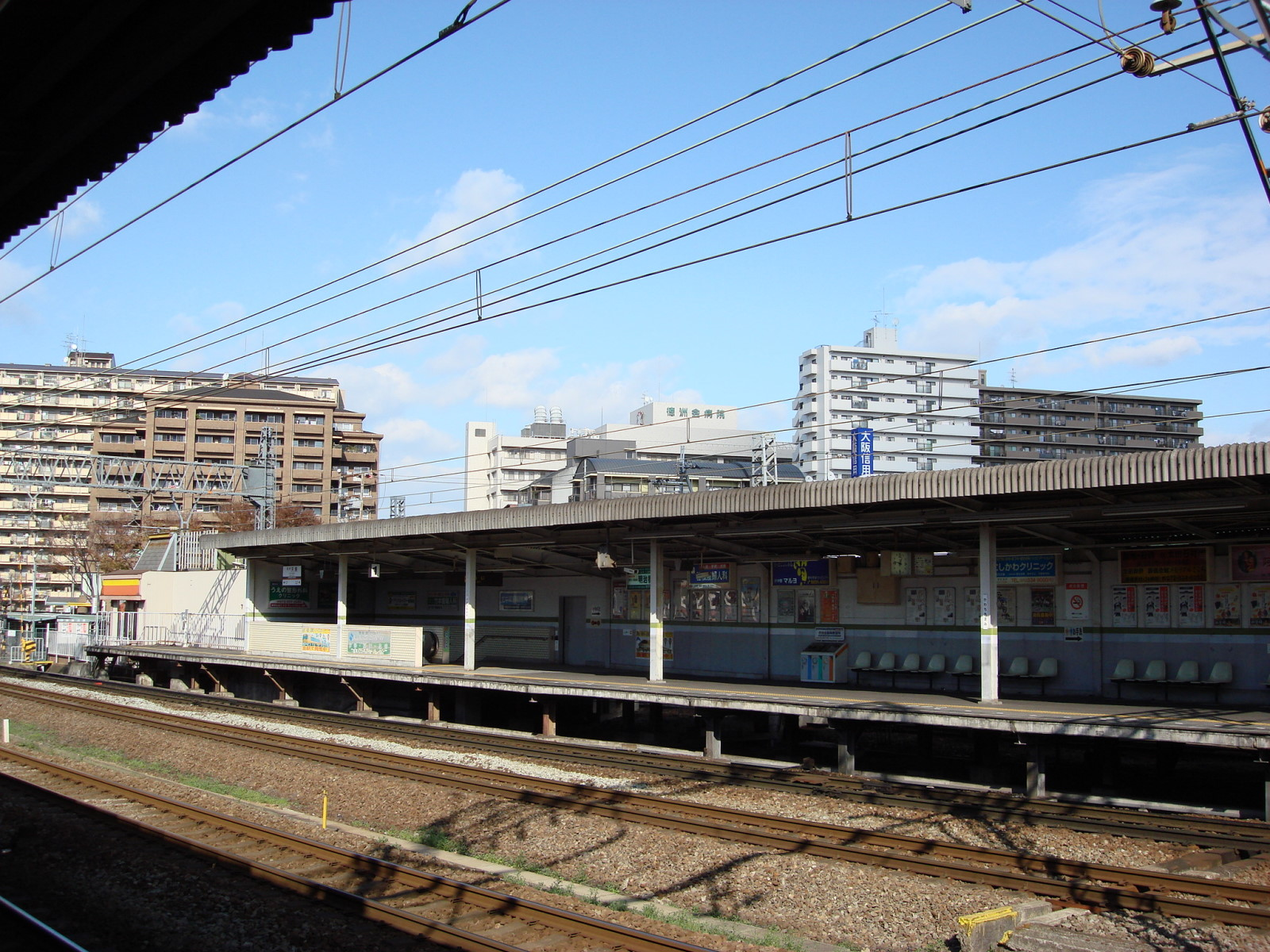 kawachiamamiSta